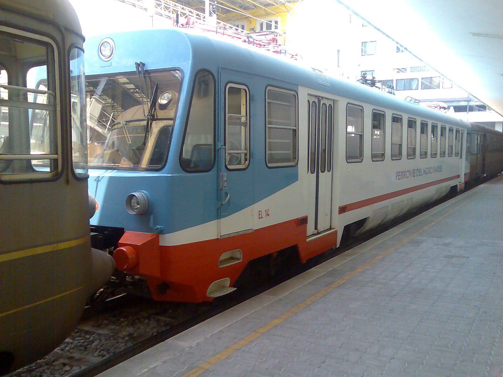 Elettromotrice EL.14 delle Ferrovie del Nord Barese in sosta a Bari